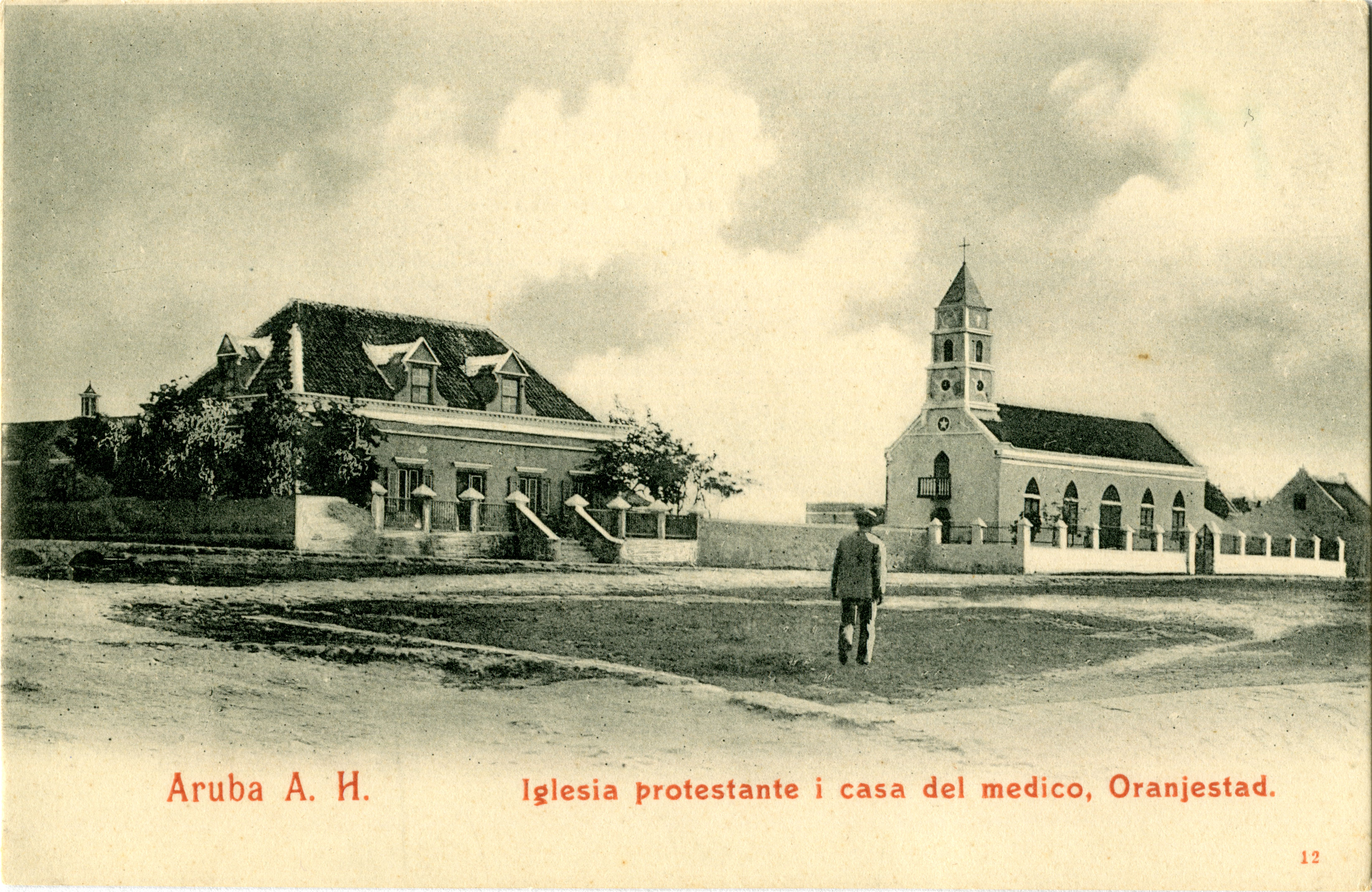 Aruba, N.A. (Nederlandse Antillen) - Protestantse Kerk en doktershuis (dr. Horacio Oduber), Oranjestad. Ansichtkaart (ca. 1907) naar aanleiding van foto gemaakt +/- 1903